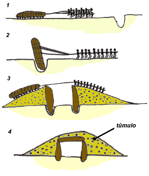 Proceso de construcción de un megalito. Dibujo realizado por Rafaelji y retocado por Willy para Enciclopedia Libre Categoría:Dibujo (imagen)